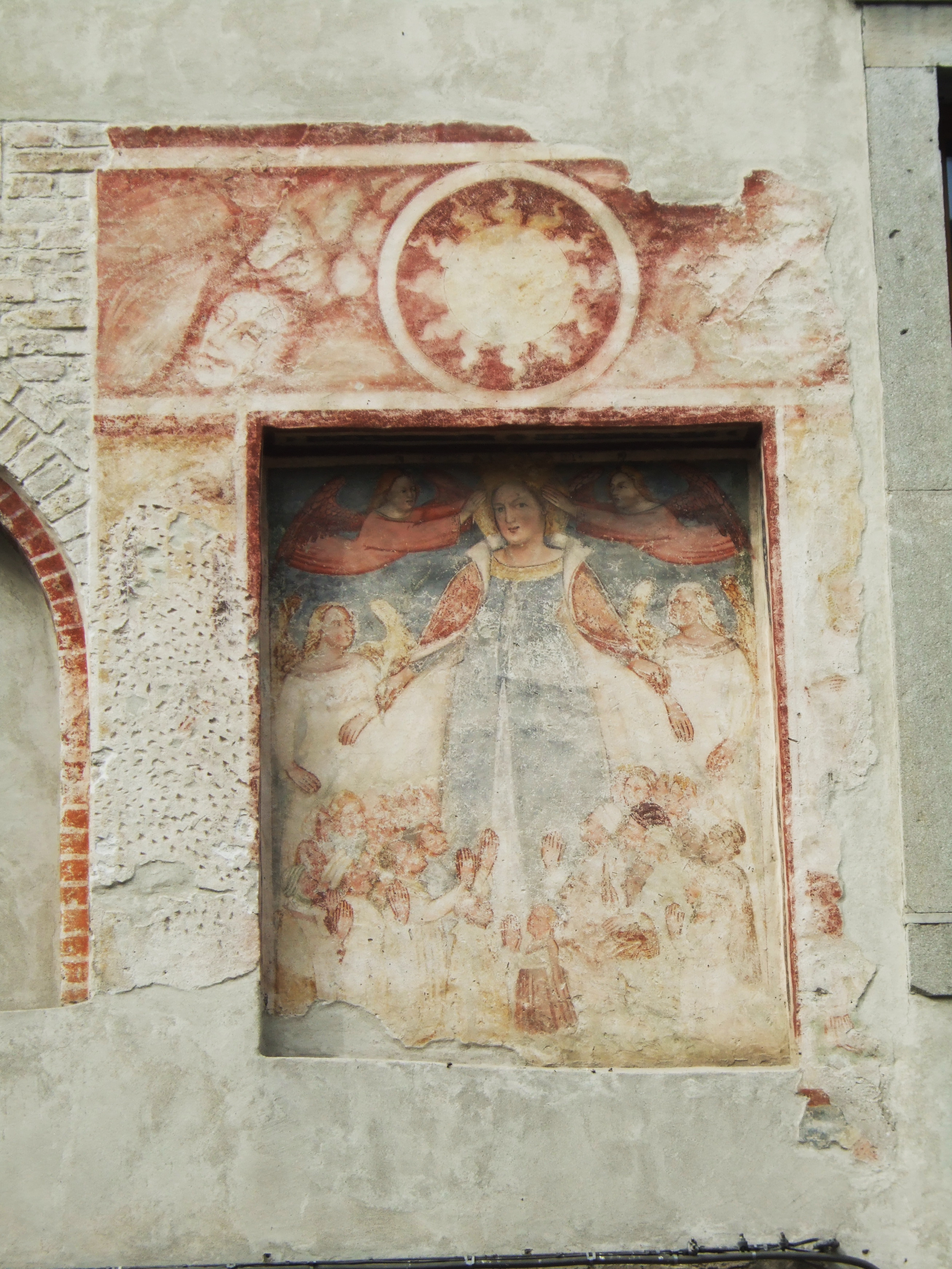 Udine - Affresco via Mantica - Santa Lucia - Autore: Giovanni Battista Grassi